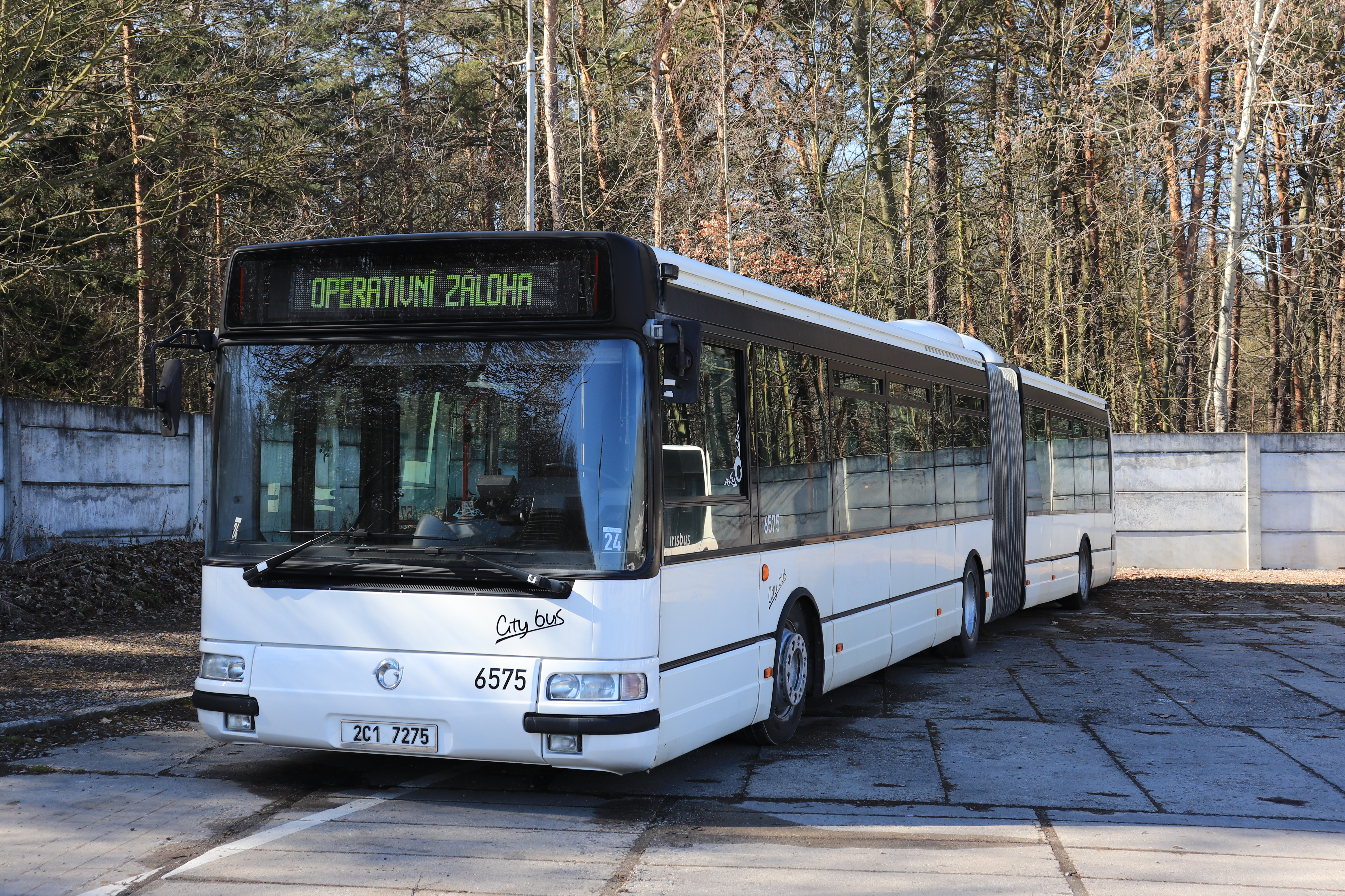 Historický Citybus 18M sběratele Martina Oškrobaného.